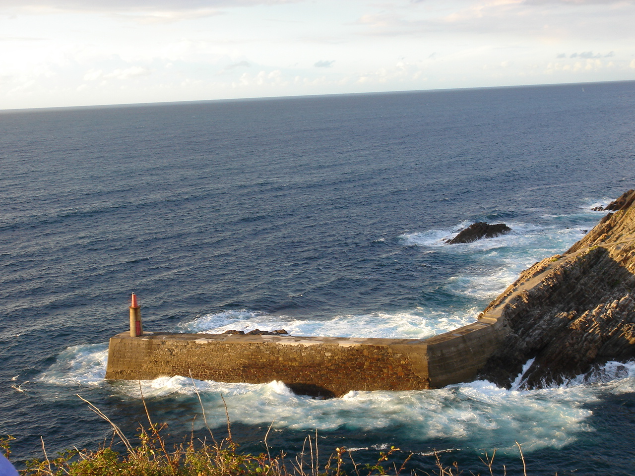 Puerto de Viavelez